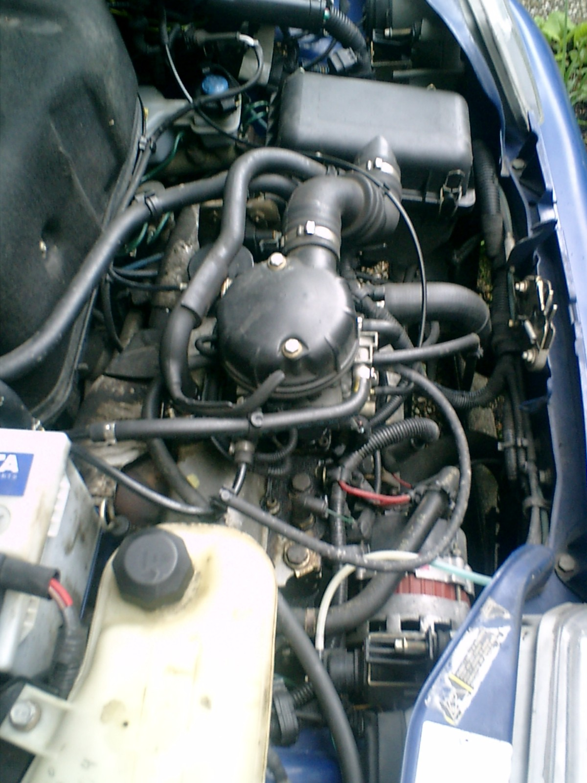 Fiat Cinquecento BJ 95 899cm³ Motor